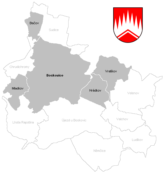 Mapka Boskovic a přidružených obcí, včetně bývalých